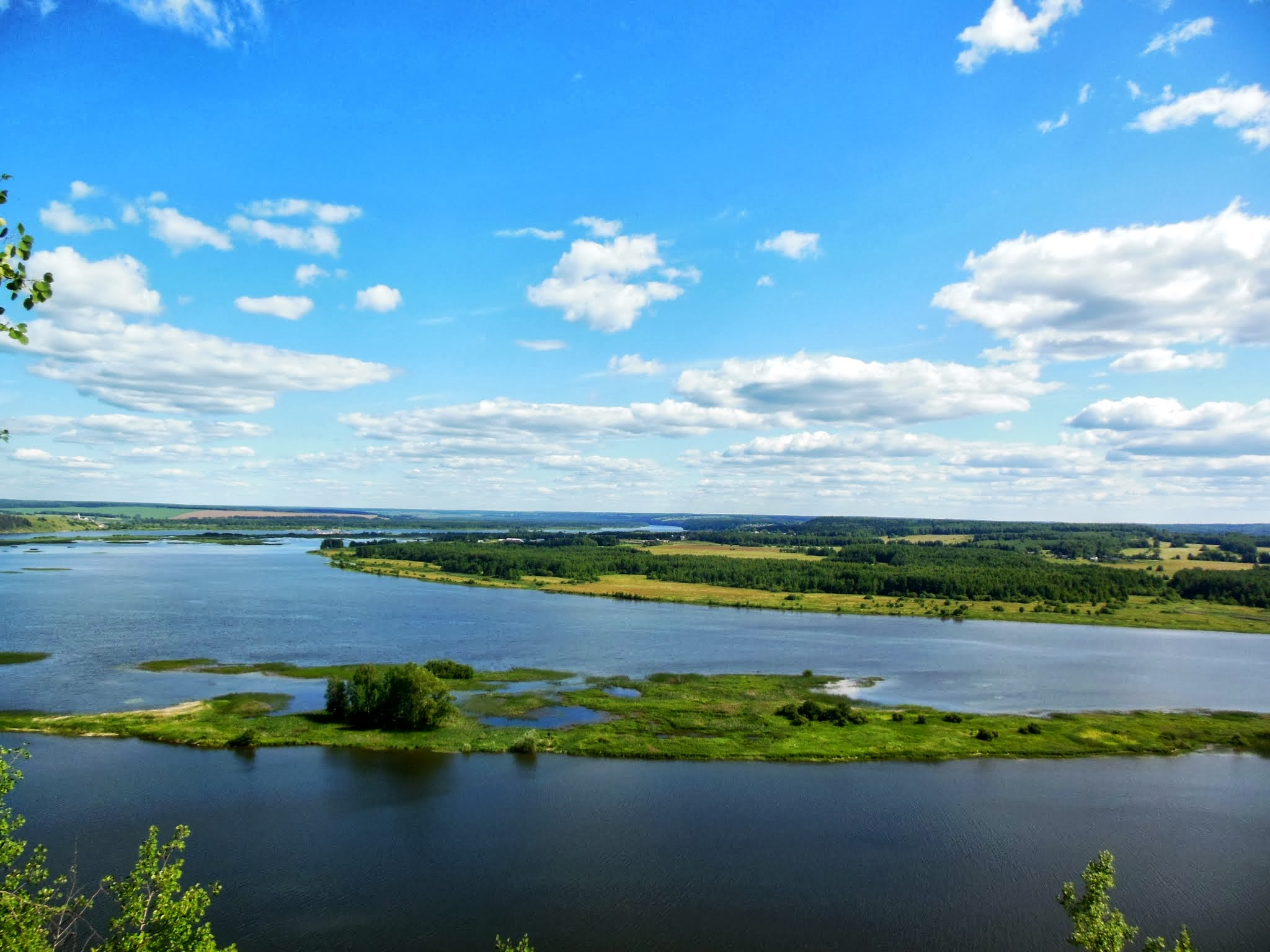 Chusovskoy r-n, Permskiy kray, Russia